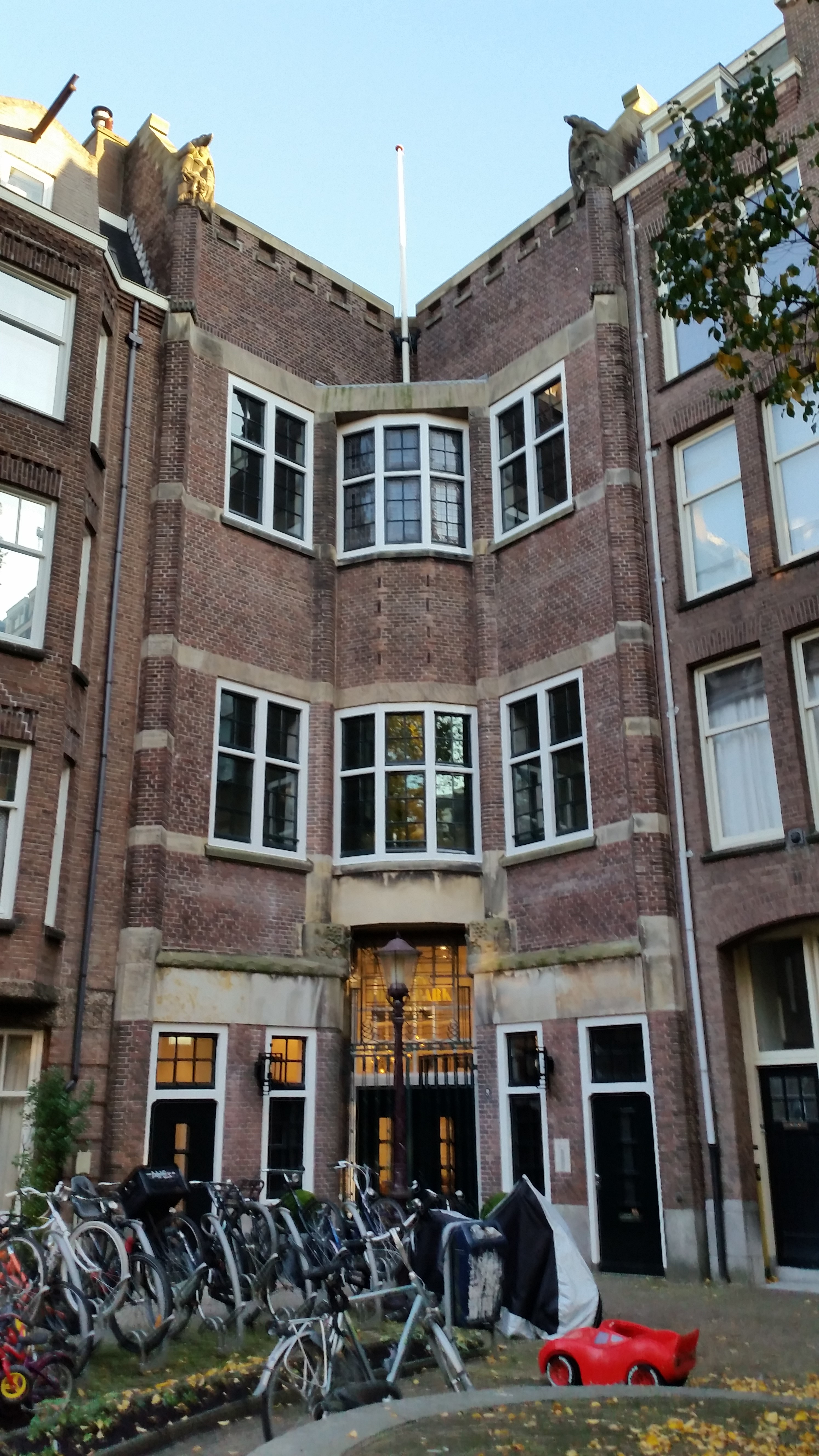 Zocherstraat 23-25, Amsterdam met boven aan de gevel en boven de poort beeldhouwwerk